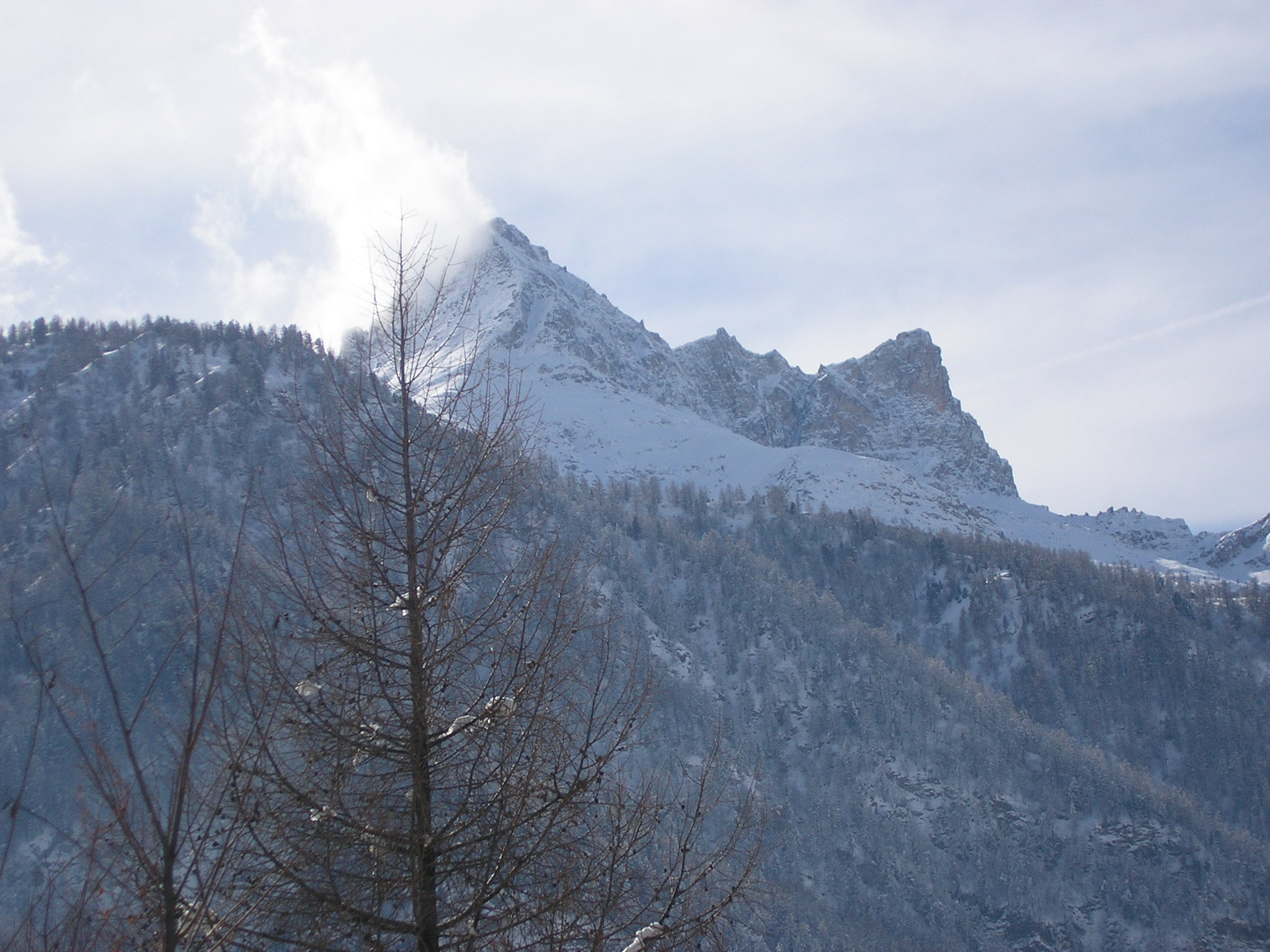 Foto scattata dalla statale all'altezza di Casteldelfino